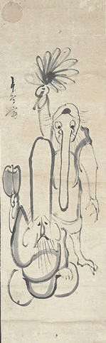 天狗寿老鼻頭くらべ